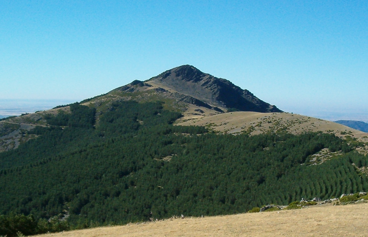 Peña de La Cabra (1831 msnm), cara Norte